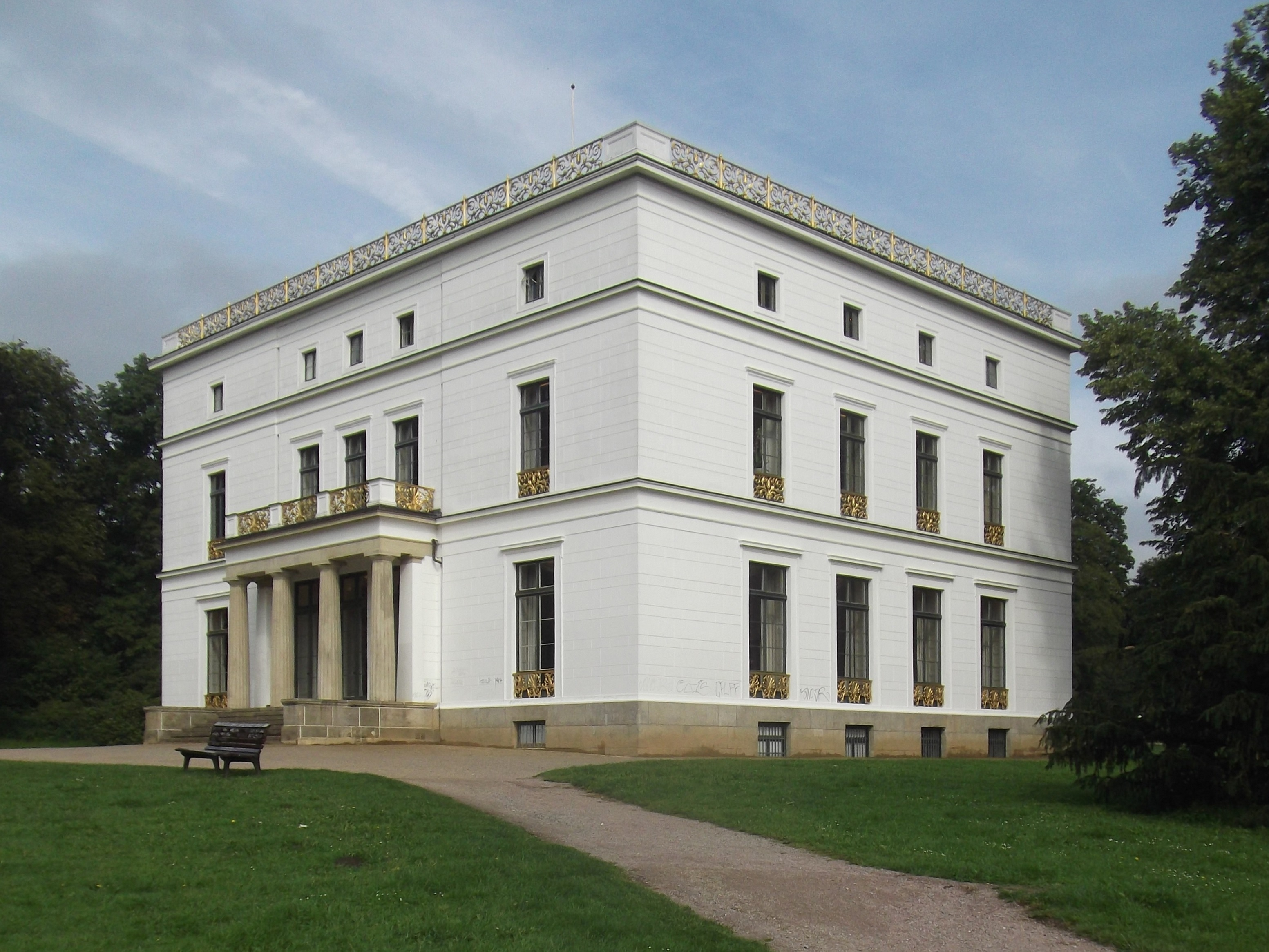 Hamburg, August 2015